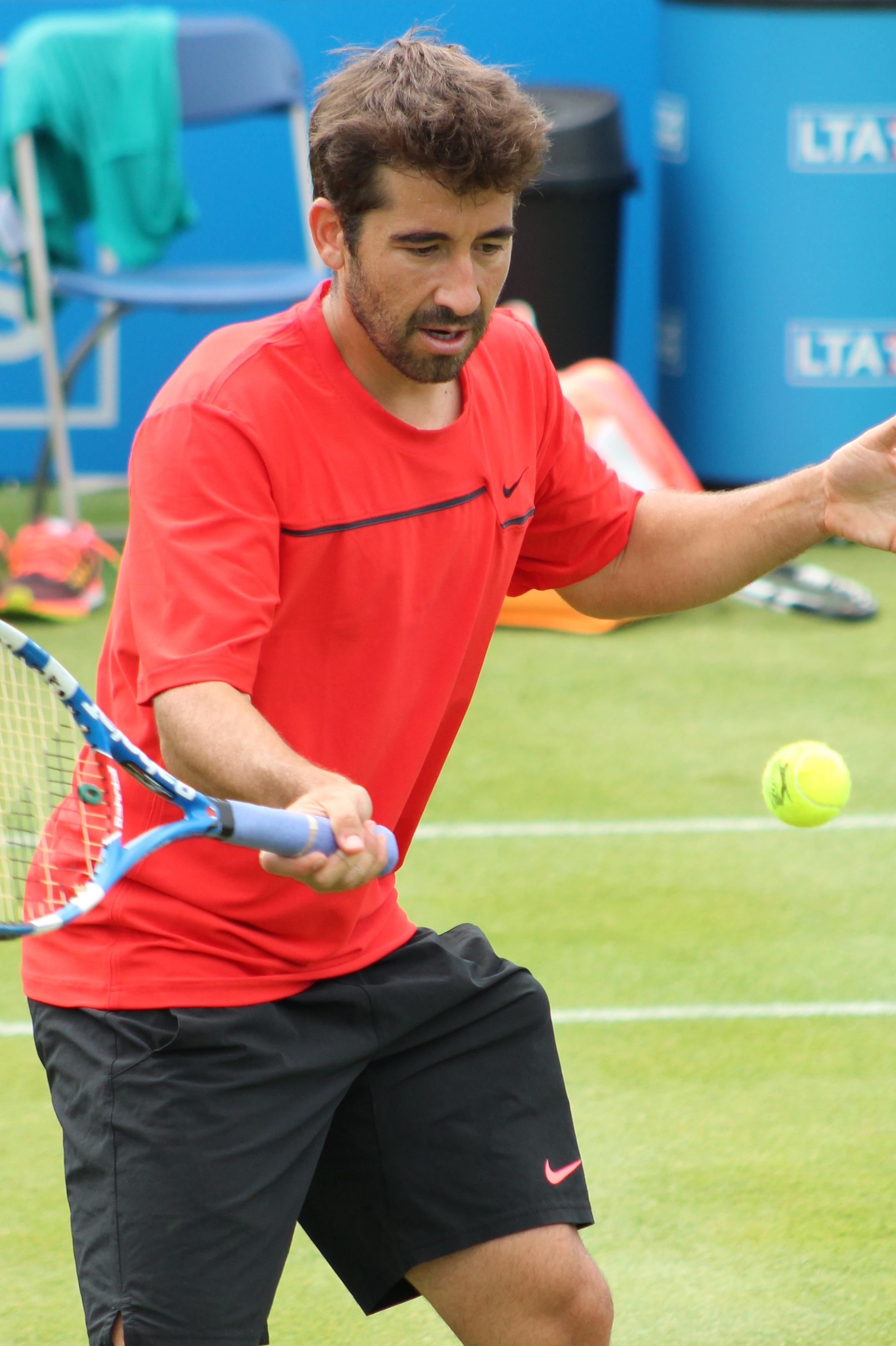 Lopez M. QC15 (6)